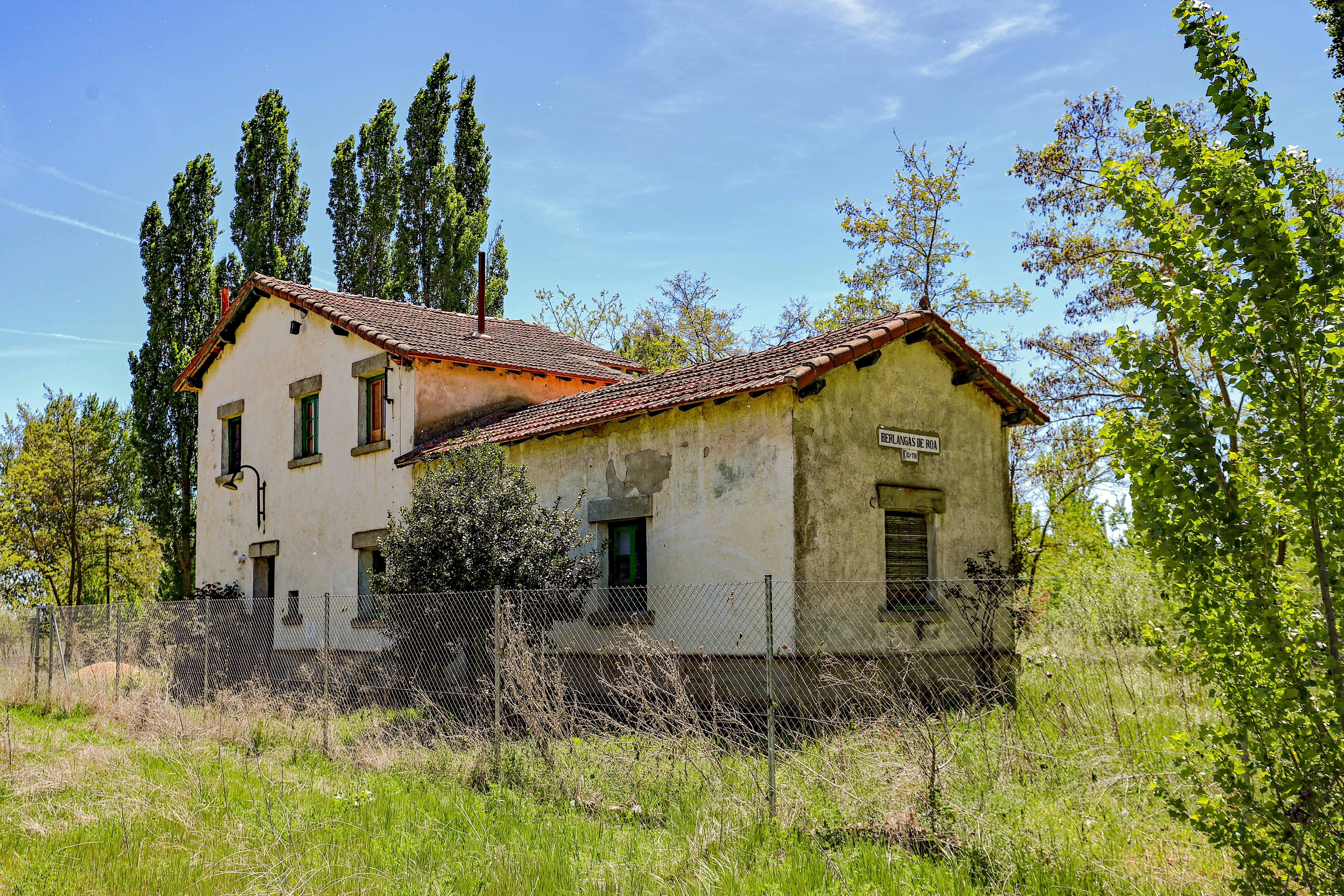 Berlangas de Roa es un municipio de la comarca Ribera del Duero, en la provincia de Burgos.